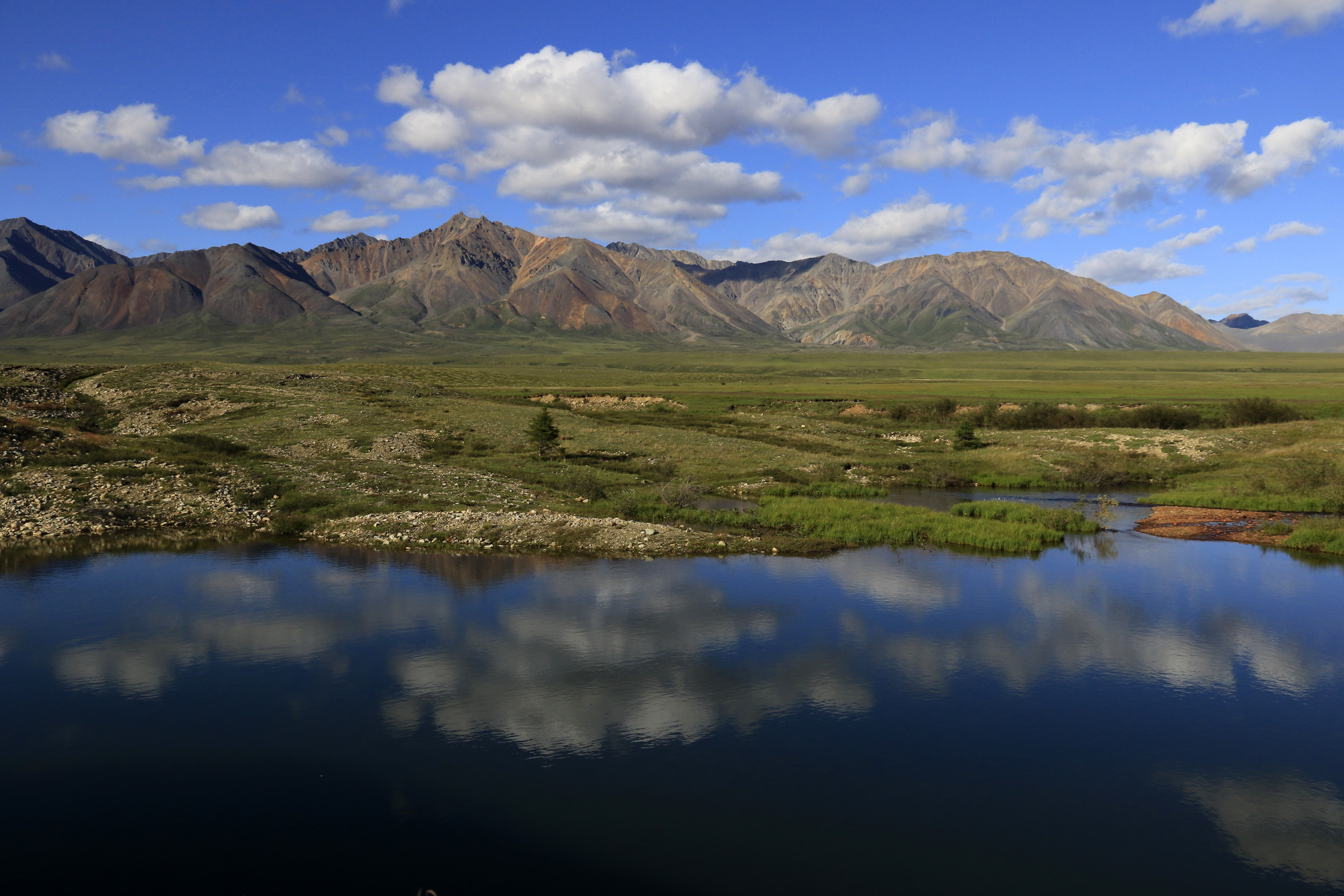 Момский: Расположен в восточной части Момо-Селенняхской впадины и охватывает собой территорию верхней части бассейна реки Момы, включая Буордахский горный массив с пиком г. Победа (3 003 м), Момский район, Якутия (Саха) This image is related to the protected area of Russia number 1410127